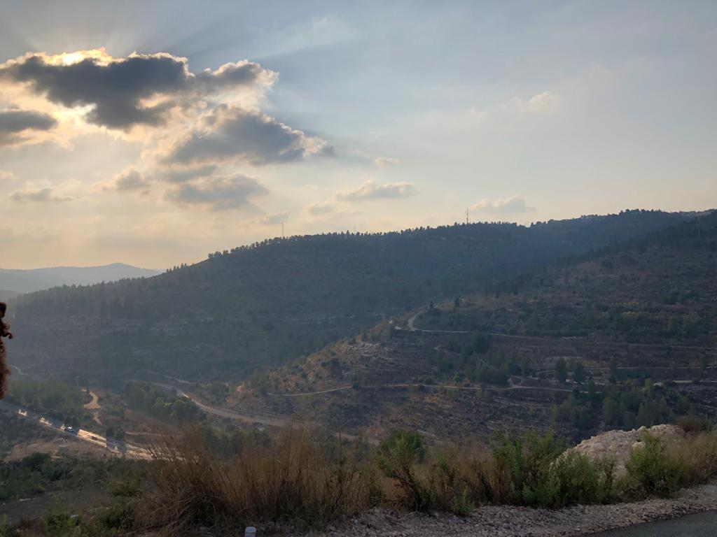 مطل من الولجة على الاراضي المحتلة